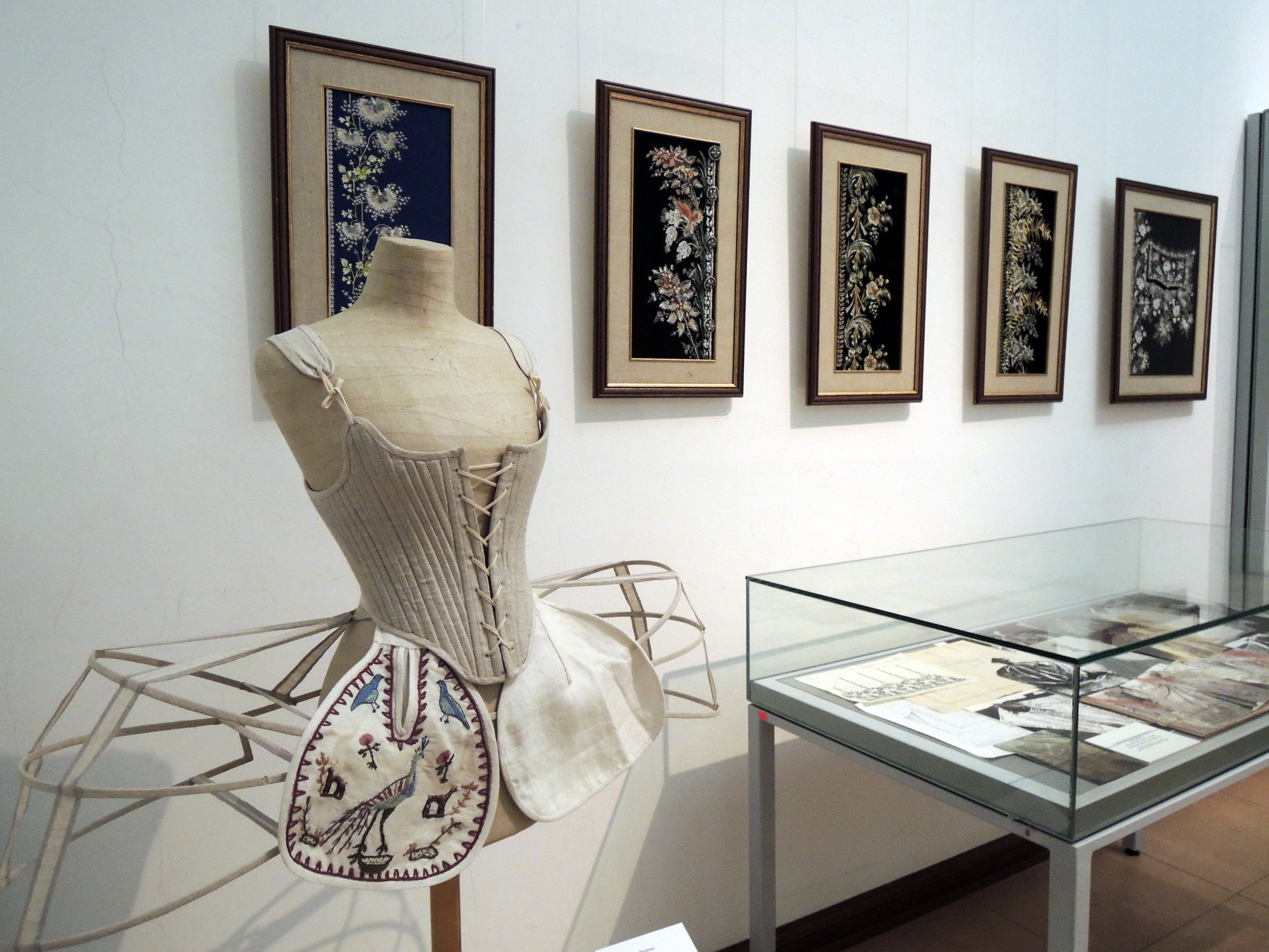 Фижмы (около 1760). Реконструкция с оригинала из Музея моды и текстиля (Франция). Курсовая работа студента 3-го курса А. Образцовой (педагог - О. Поликарпова). Льняное полотно, сталька. Кафедра сценического костюма Школы-студии МХТ им. А.П. Чехова